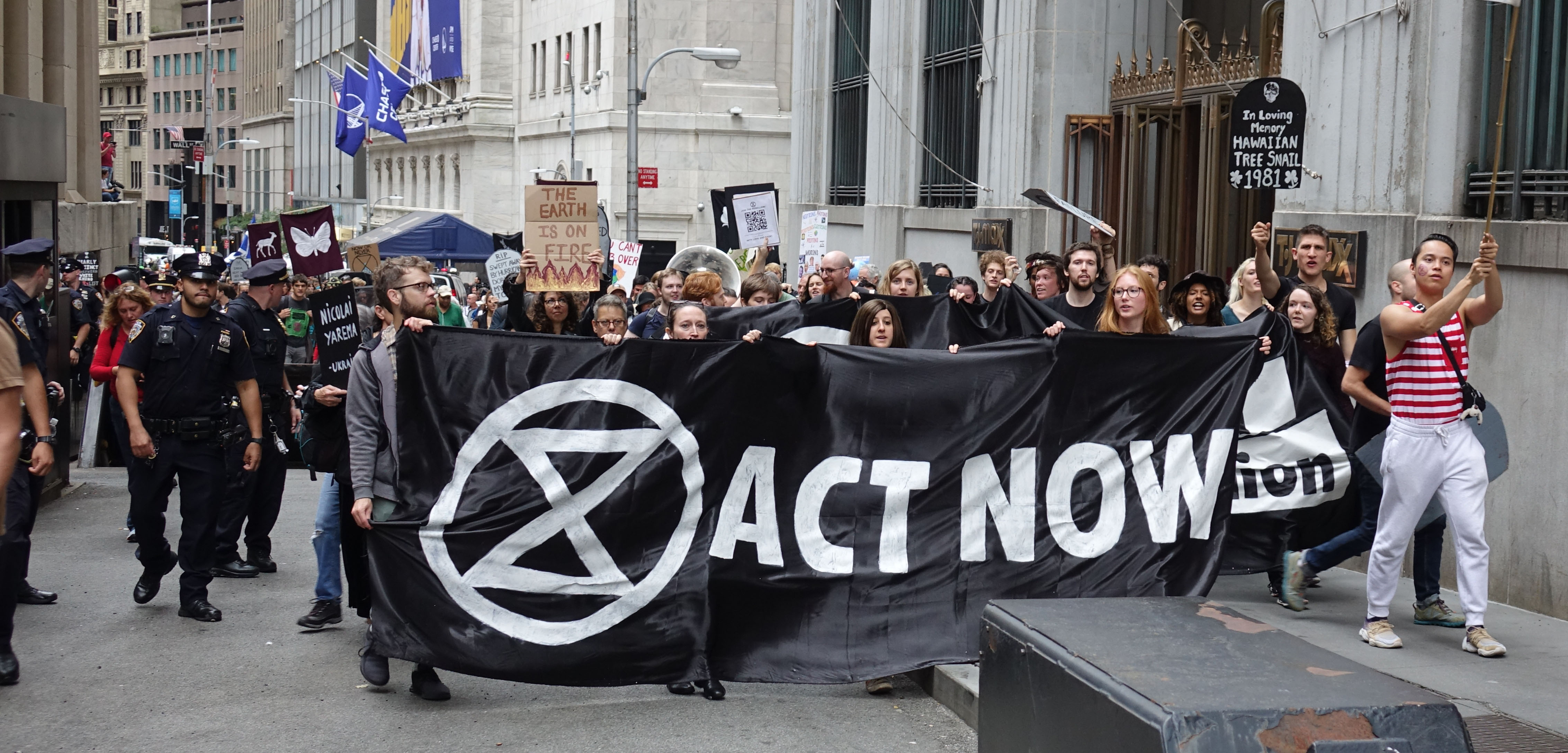 115 XR at Stock Exchange